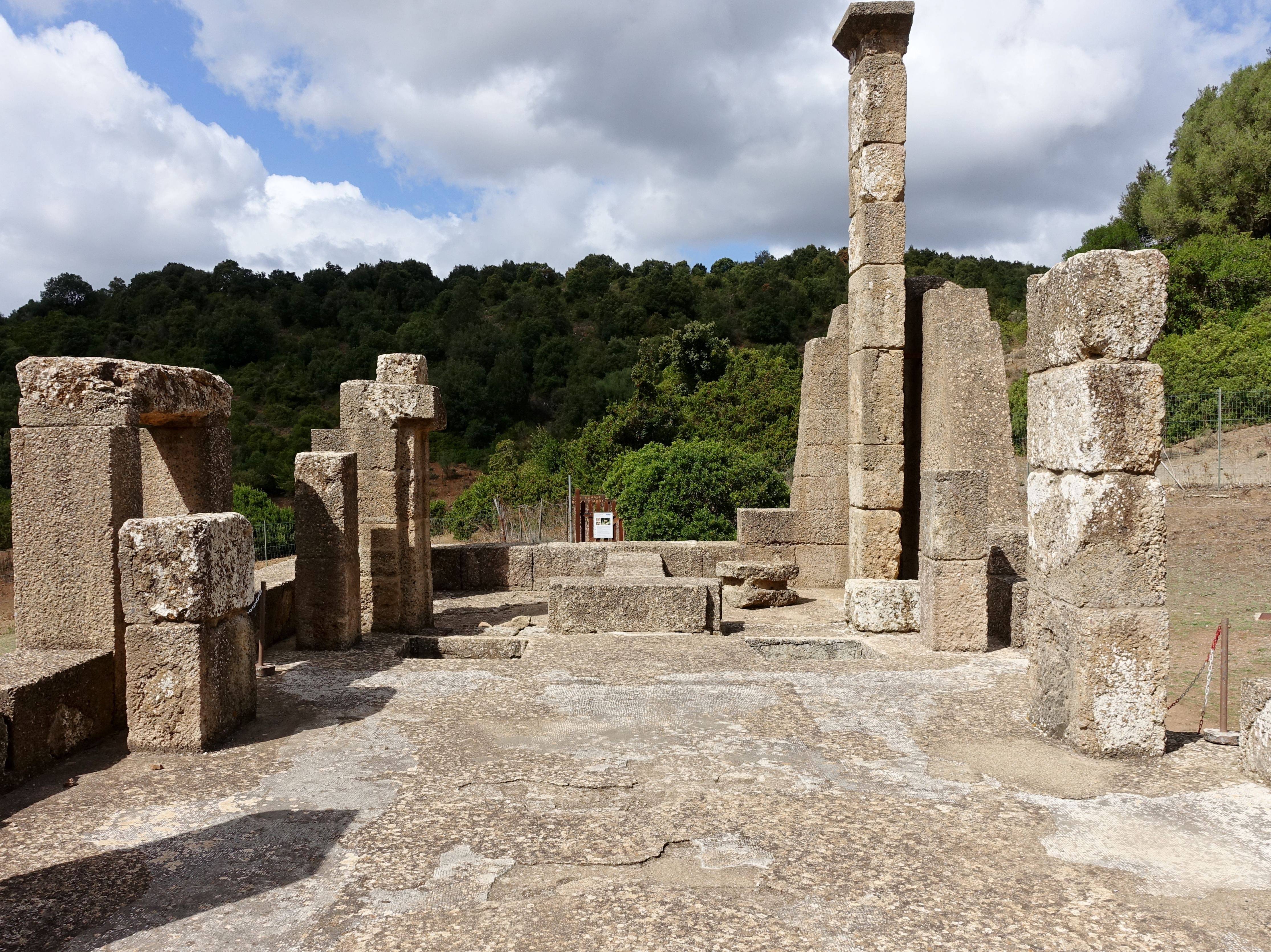 Römischer Tempel von Antas (Tempio di Antas), Gemeinde Fluminimaggiore, Sardinien, Italien